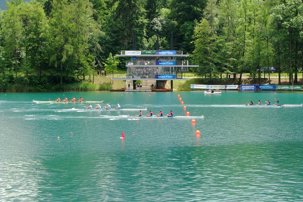 Ciljna črta veslaške regate na Blejskem jezeru, dvojni četverci